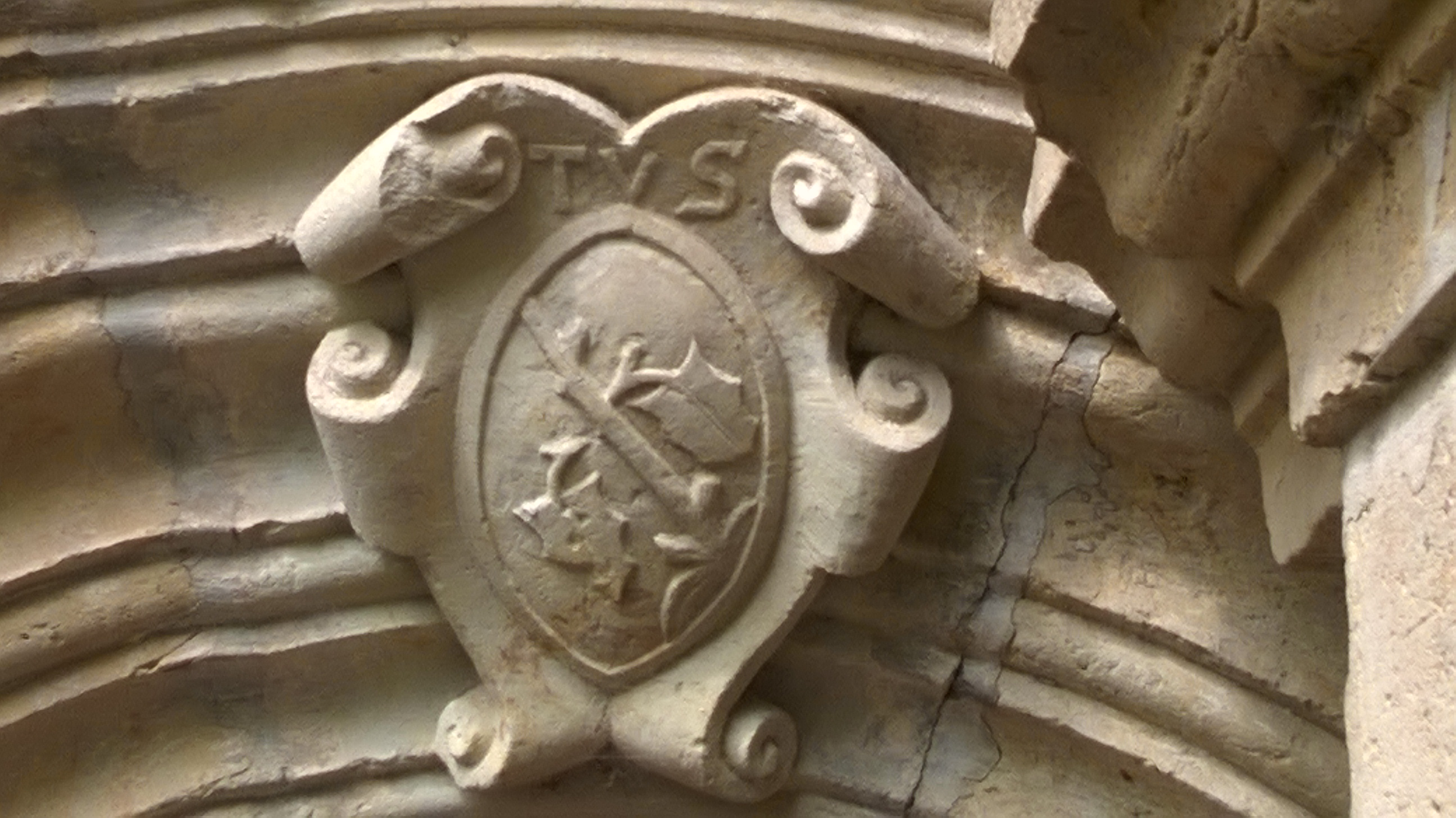 Wappen der Familie v. Sebottendorf, gesehen im Rottwerndorfer Schloss